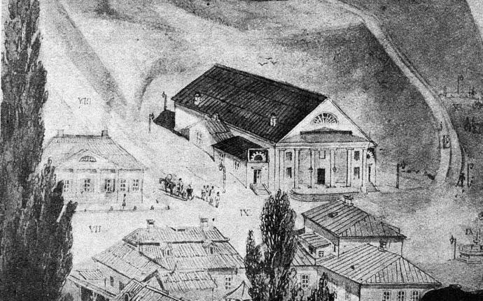 Первый Городской театр в Киеве. Рисунок неизвестного автора, ок. 1850